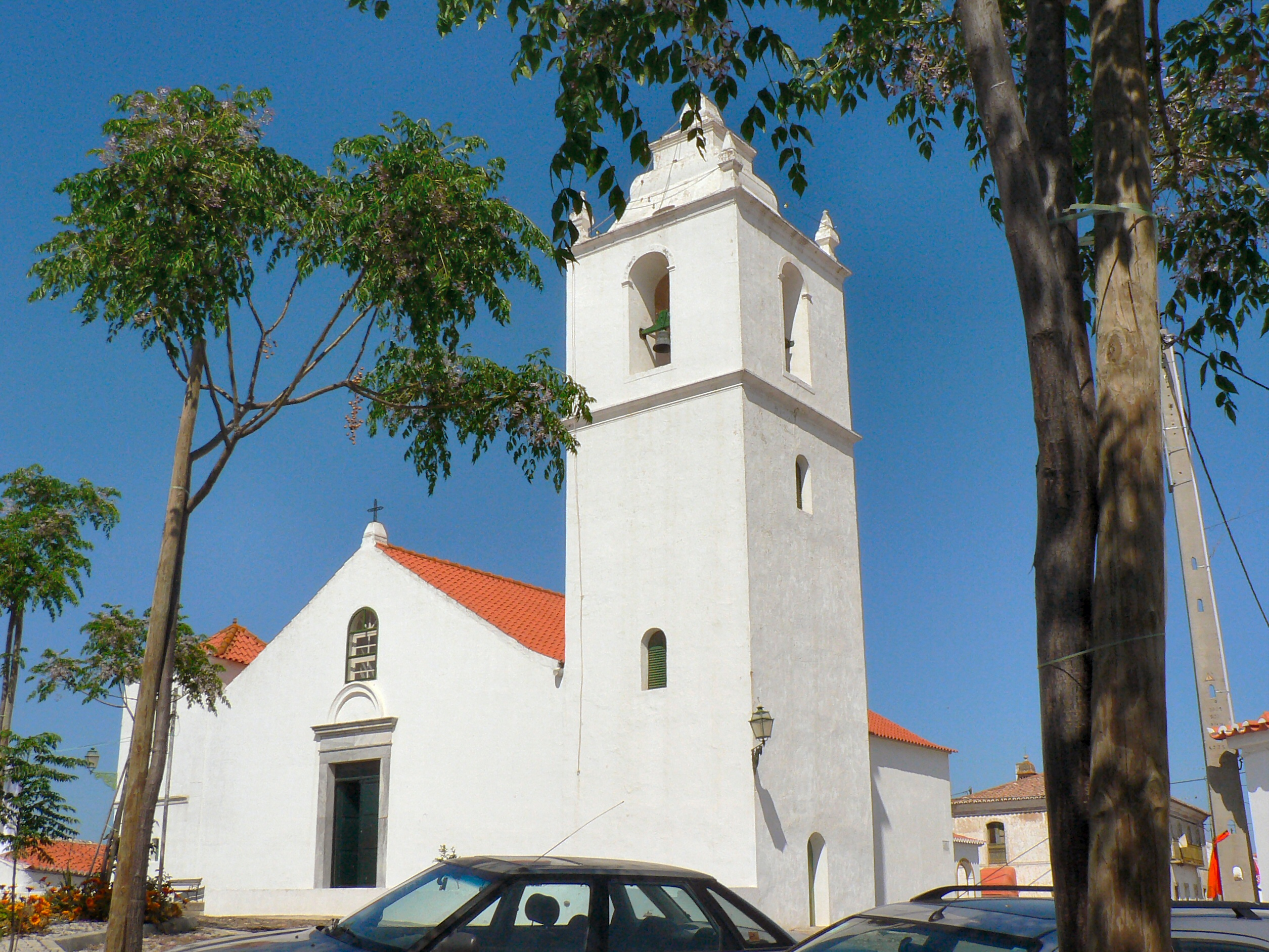 Igreja de Santana de Cambas